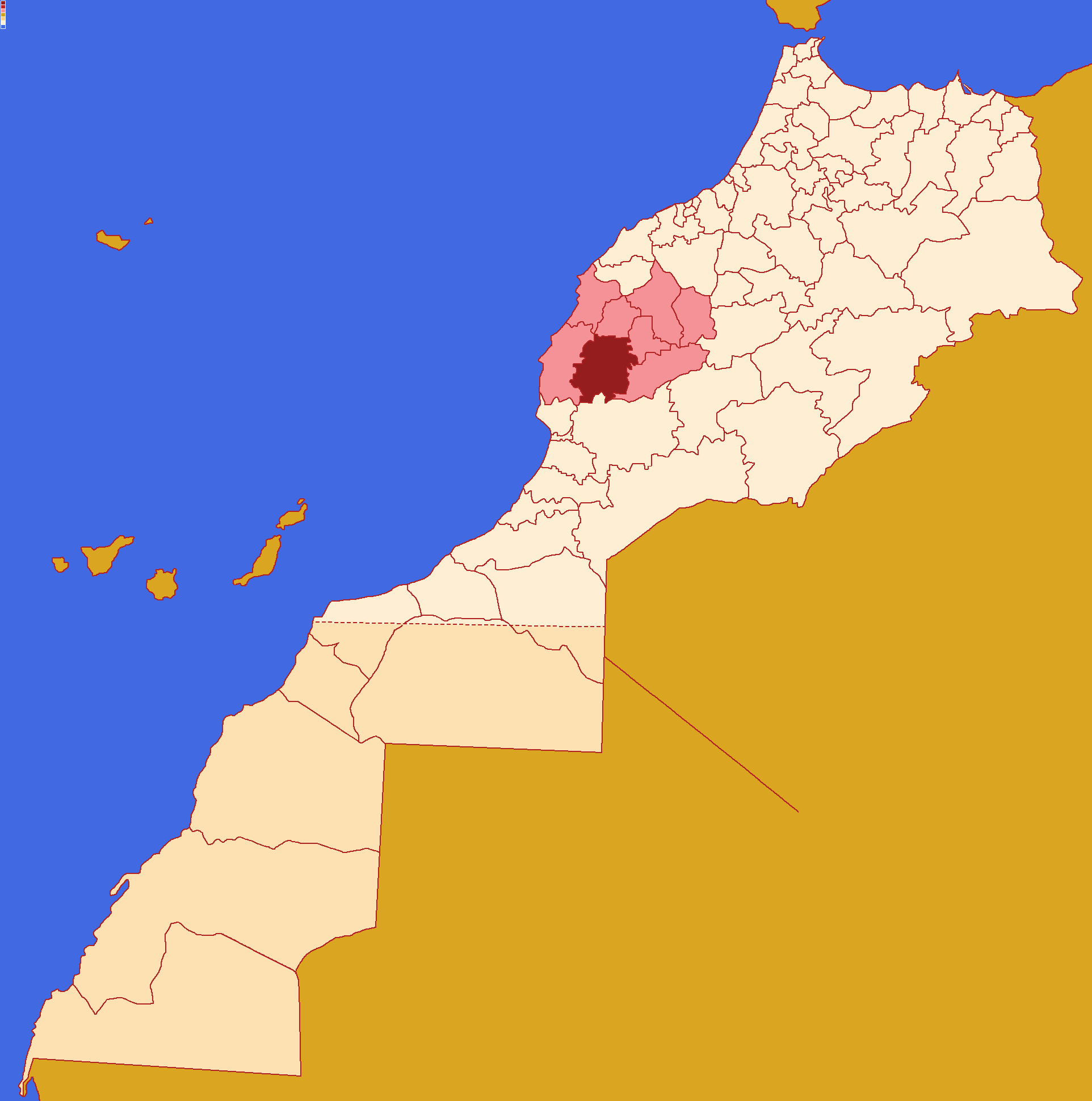 Localização da província de Chichaoua ,dentro da região de Marraquexe-Safim e dentro de Marrocos. Conforme a reforma administrativa de 2015.